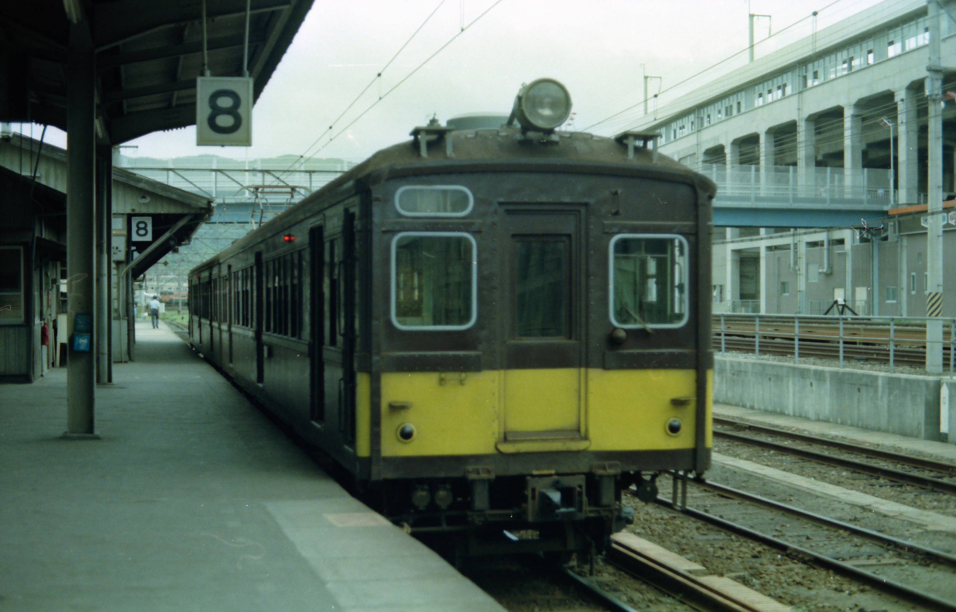 宇部線 クモハ４１０２２ 撮影S54-8 小郡駅